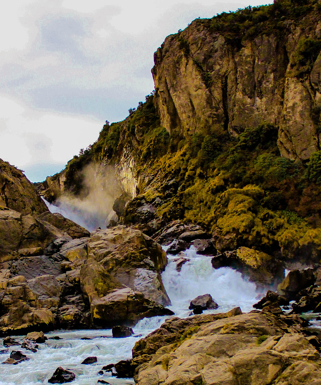 Salto del Río Ibáñez, en la Comuna de Ibáñez, Región de Aysén.